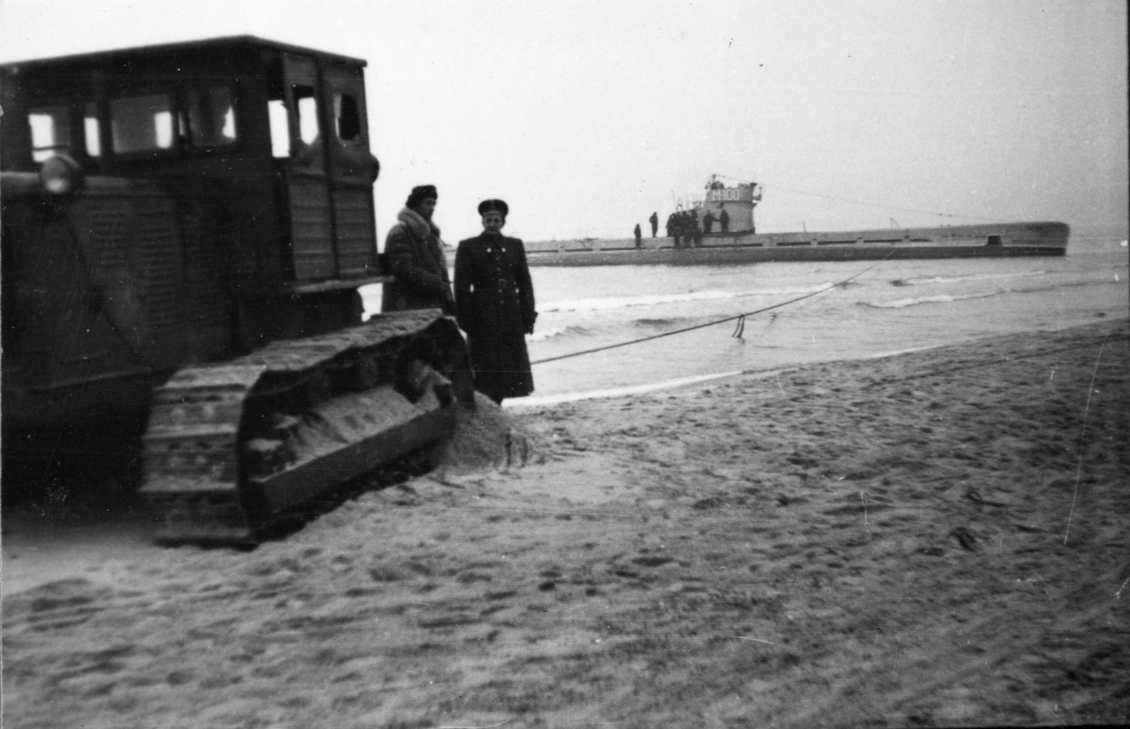 ORP Kaszub M100 w trakcie akcji ściągania z mielizny - Łysica 1957r.